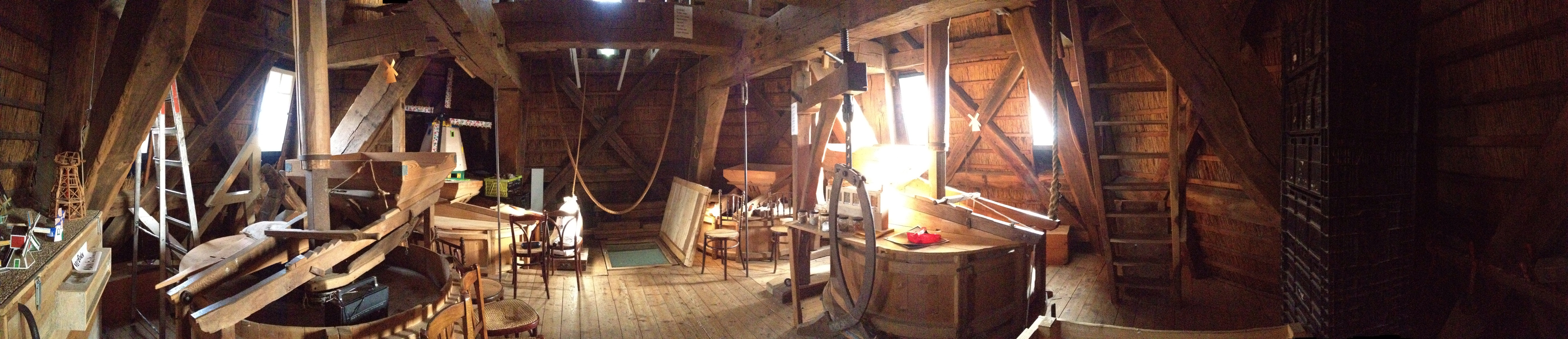 Maalzolder met 3 orginele maalstenen